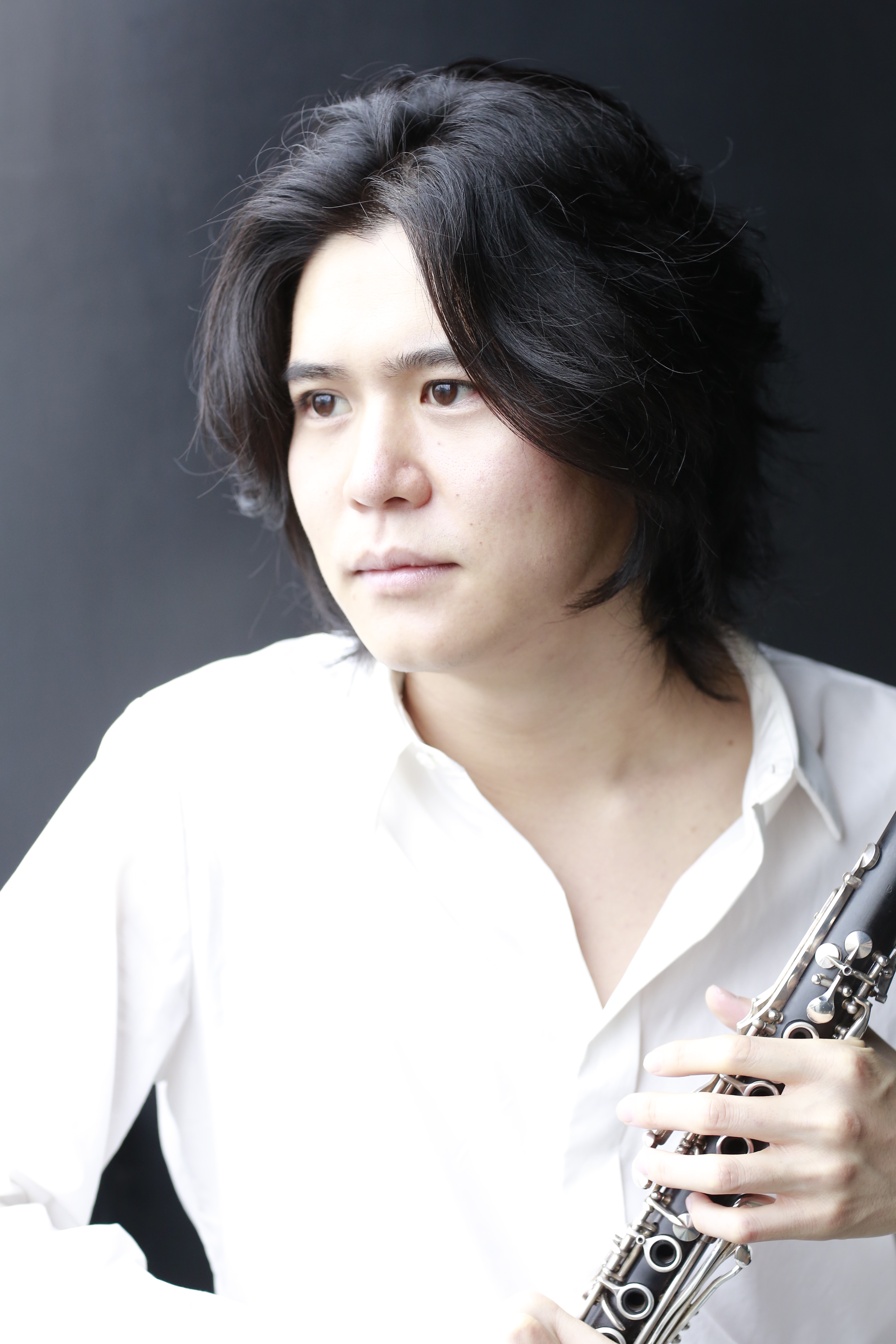 Makoto Yoshida